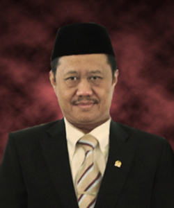 Dr. Aidul Fitriciada Azhari, S.H., M.Hum. sebagai Anggota Anggota Komisi Yudisial Republik Indonesia periode 2015–2020